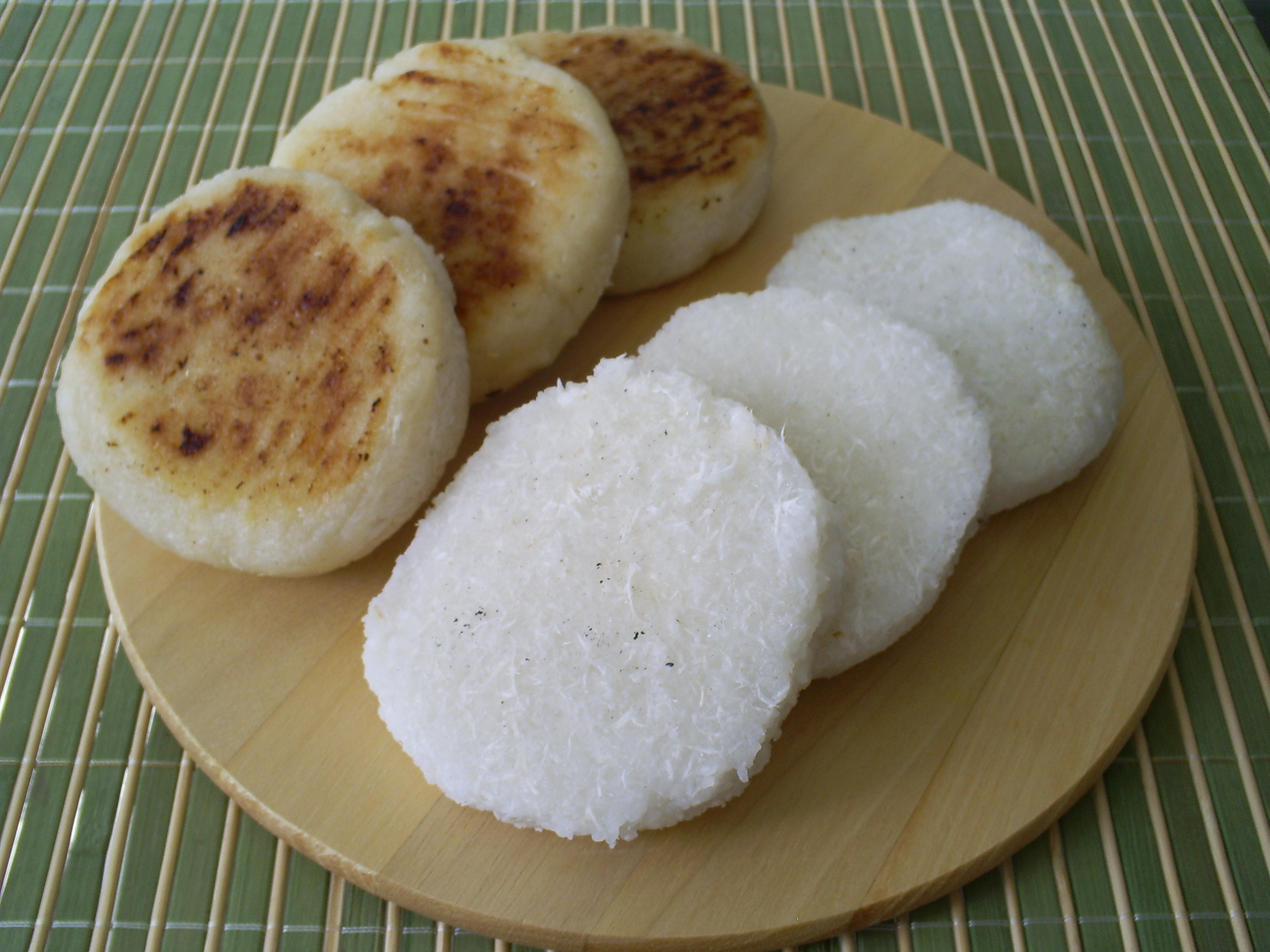 Pratos típicos região nordeste do Brasil; goma de mandioca, coco ralado, sal e açúcar (à esquerda da foto o Malcasado, à direita o Sarolho)